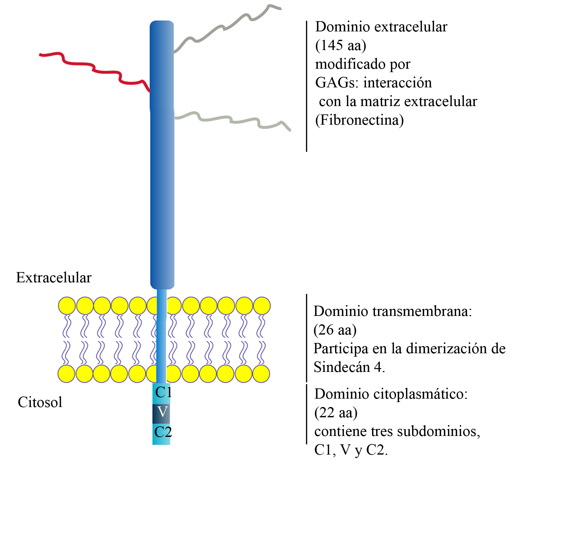 Representación de la estructura de Sindecán-4